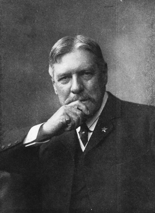 Portreto de John Pollen, brita esperantisto